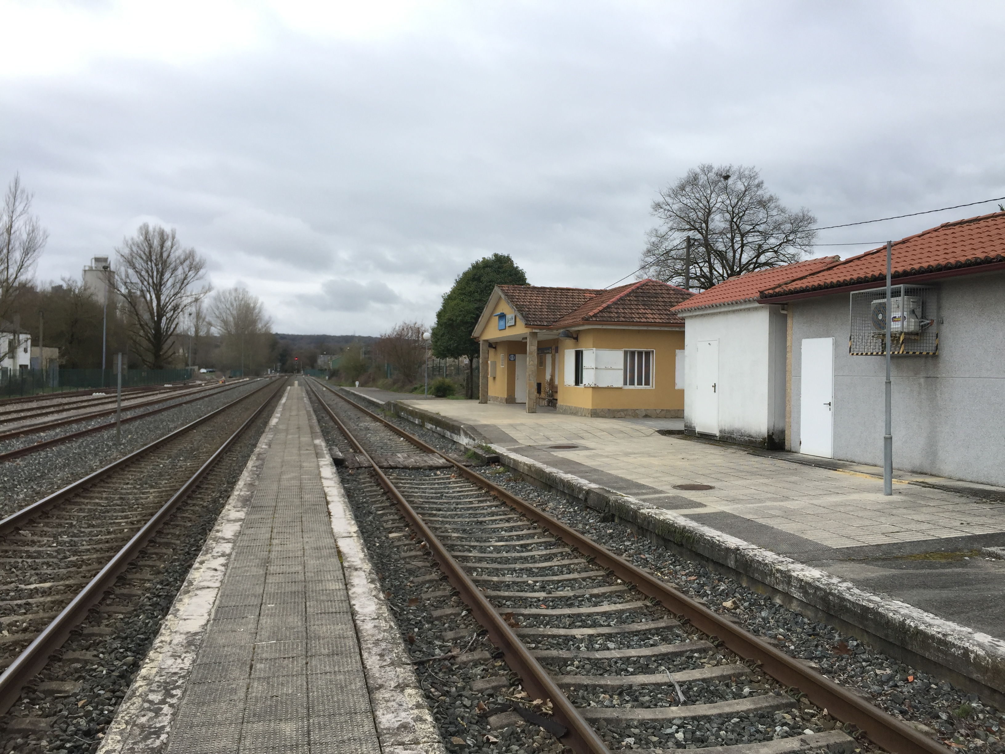 Estación ferroviaria de O Oural, en el municipio de Sarria, provincia de Lugo, España.